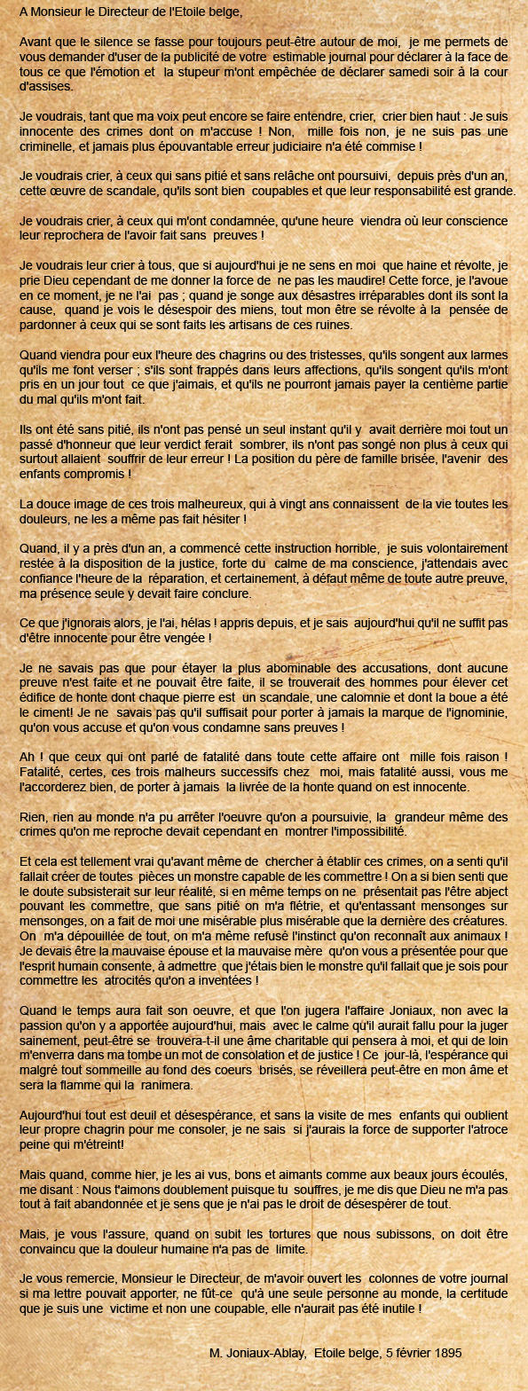 Copie de la lettre de Marie Thérèse Joniaux-Ablay adressée au journal l'Etoile belge, le 5 février 1895